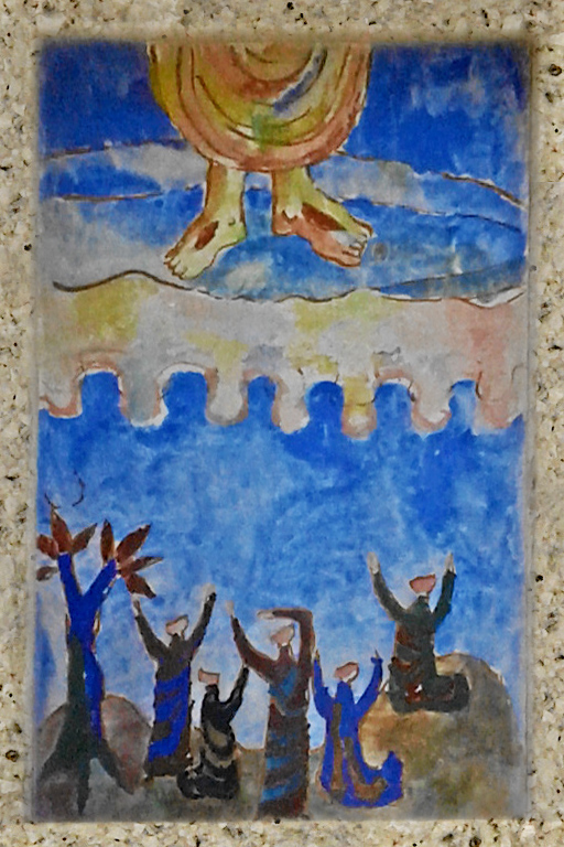 Bildstock Nr. 4 Richtung Osten - Bundesstraße, Thaur